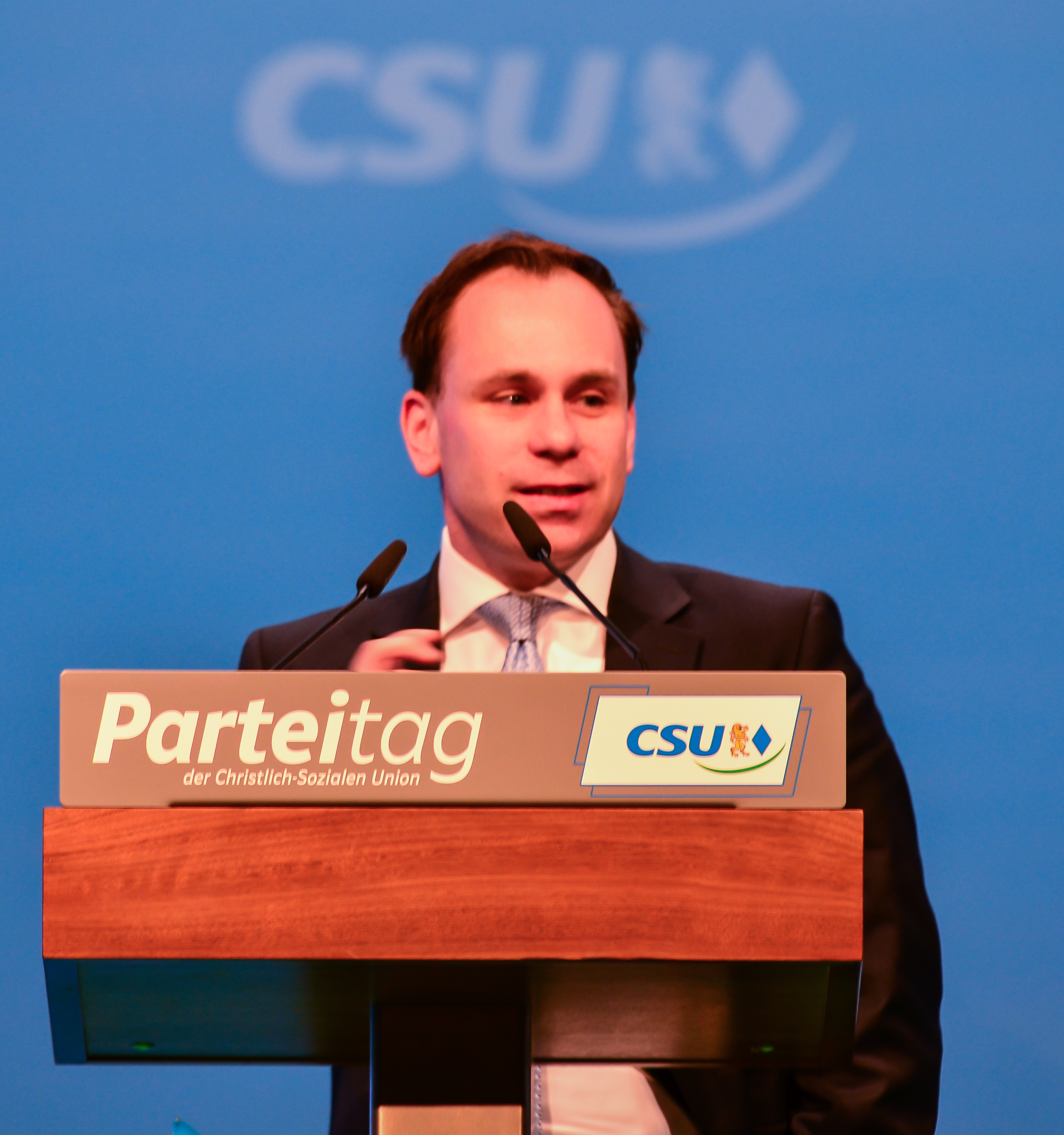 CSU Parteitag 2013 am 23.11.2013 in München